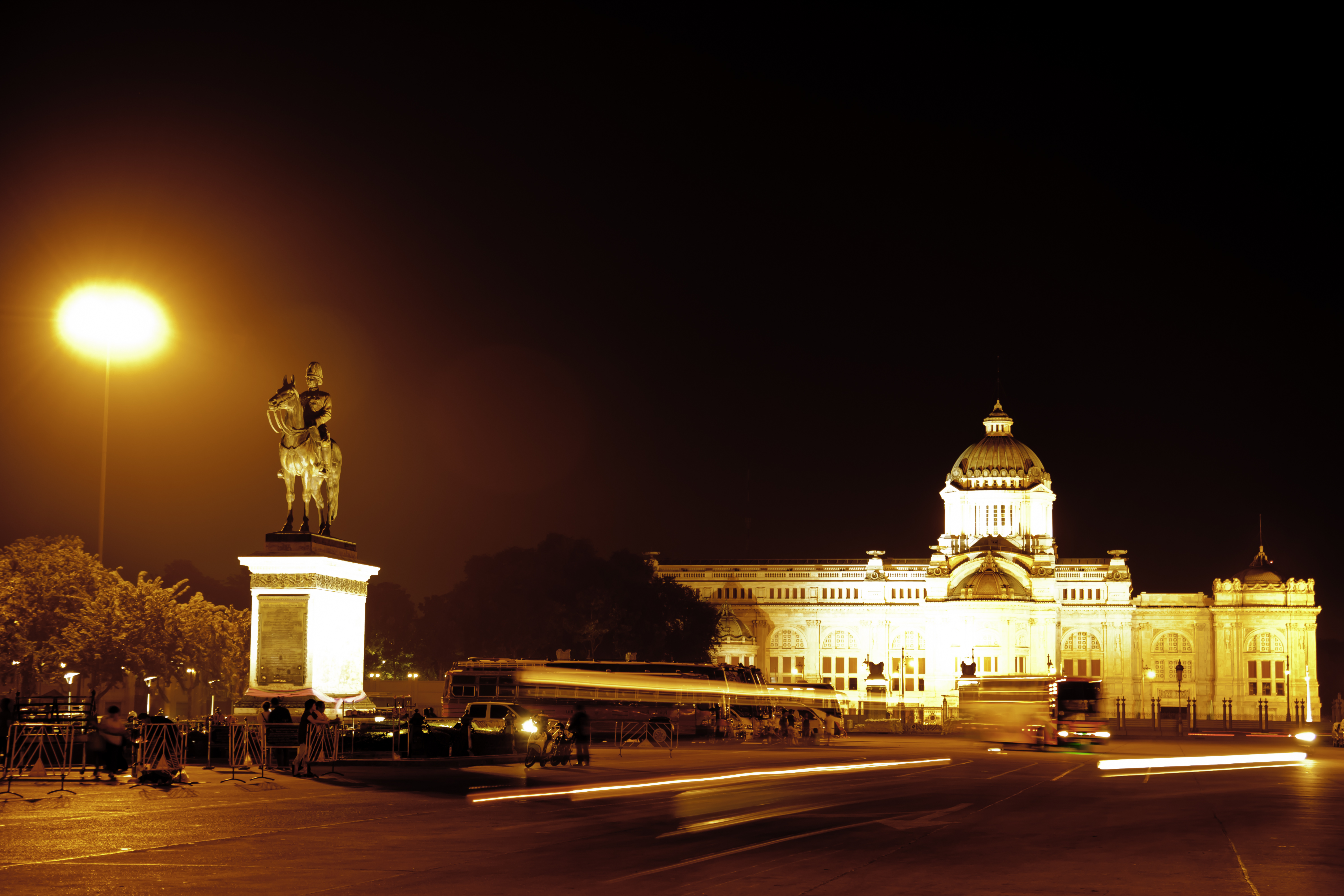 ลานพระบรมรูปทรงม้า